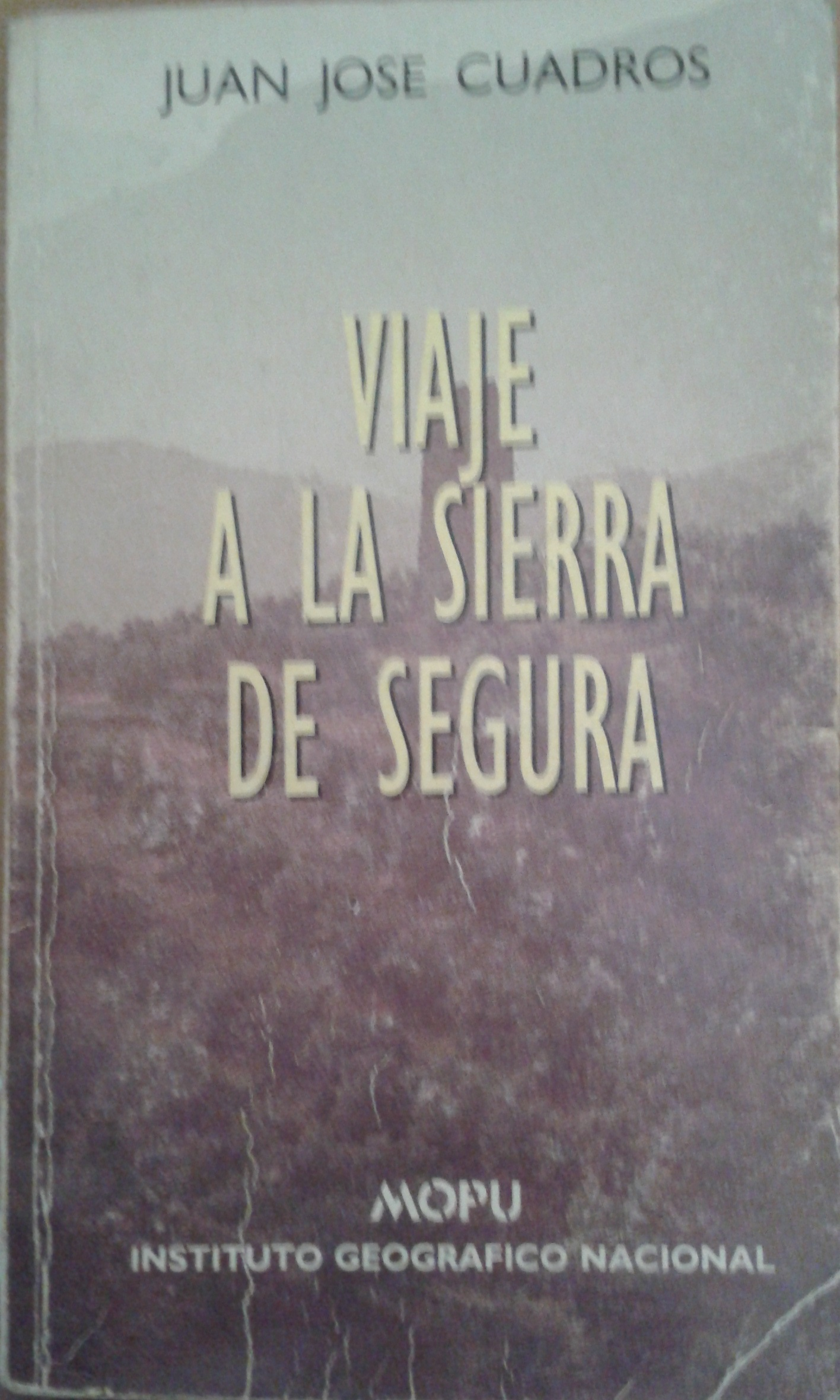 Viaje a la Sierra de Segura, de Juan José Cuadros, (1990)